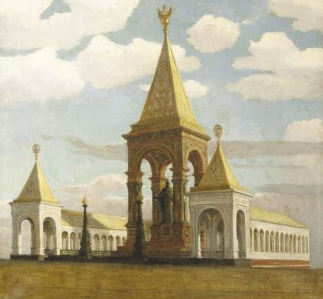 Проект памятника Александру II